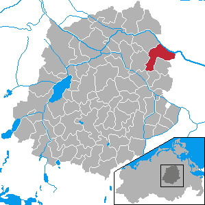 Jarmen, Landkreis Demmin, Mecklenburg-Vorpommern